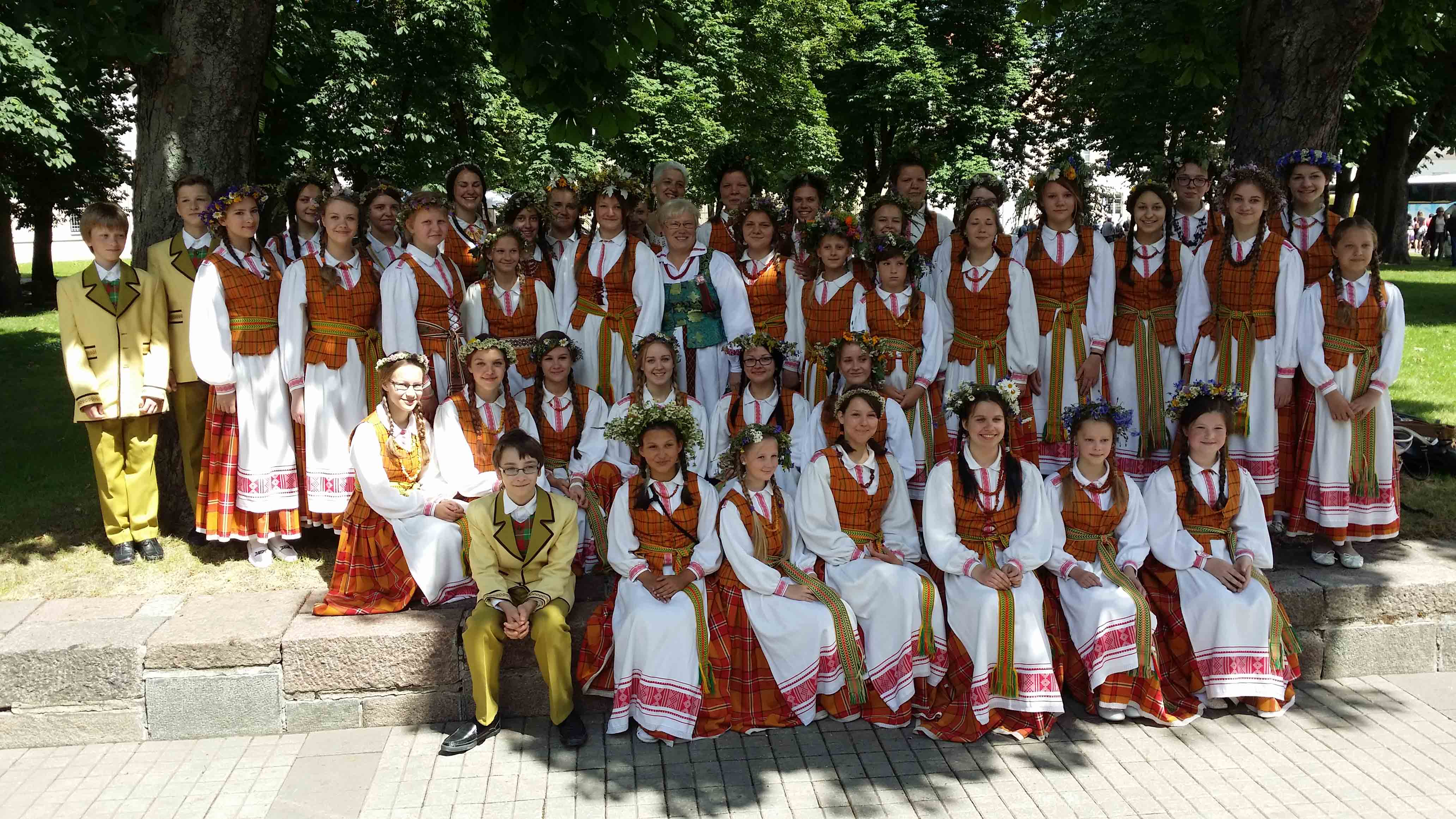 Lietuvos nacionalinio radijo ir televizijos vaikų choras